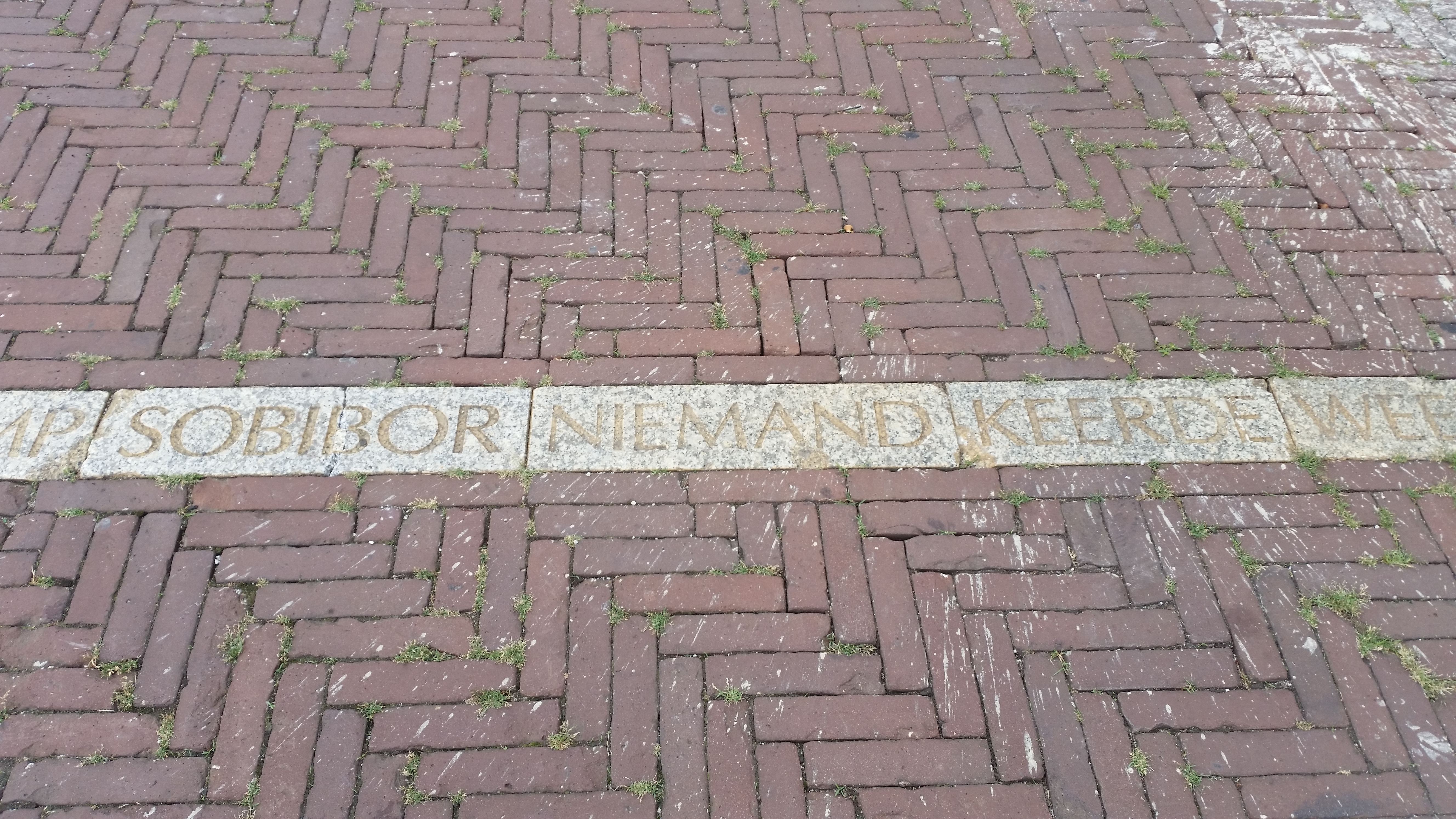 Gedenkteken voormalig Nederlands-Israëlisch jongensweeshuis, deel 18